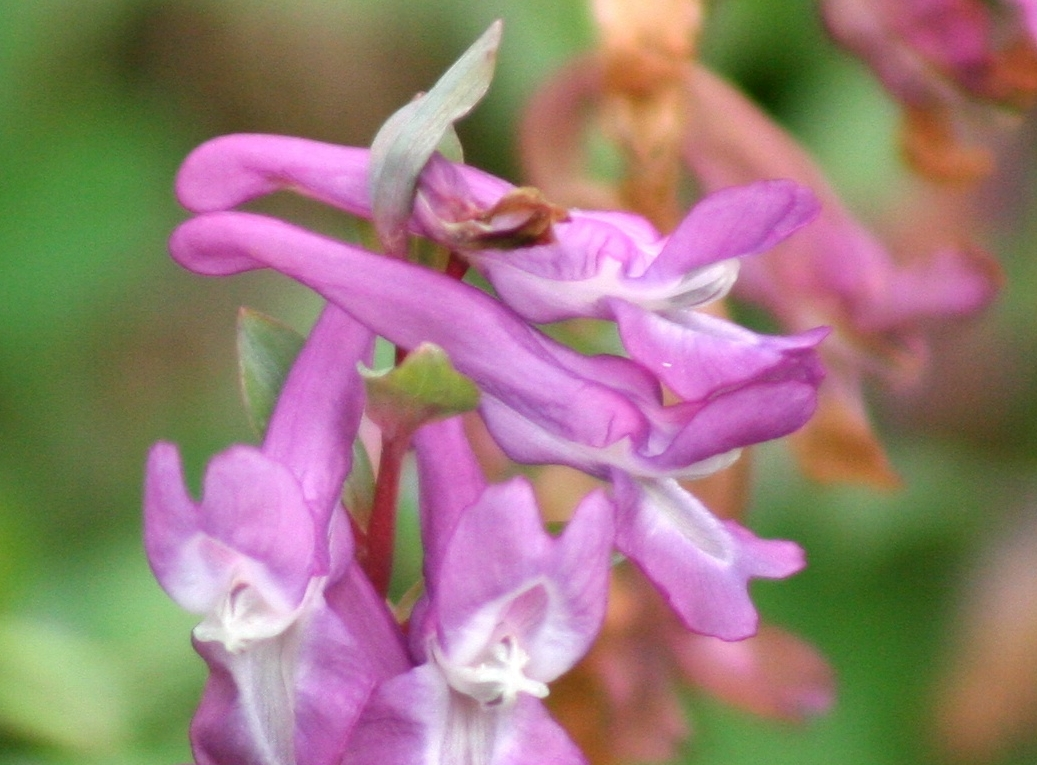 Corydalis_cava (Colombina cava) Localita : Farra, Mel (BL), 330 m s.l.m.